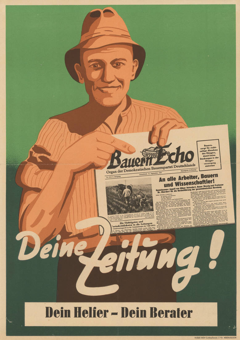 Bauern Echo Deine Zeitung! Dein Helfer - Dein Berater Abbildung: Bauer mit Bauern Echo (Grafik) Kommentar: Im Original zwei zusammengeklebte Plakate, rückseitig beschriftet. Plakatart: Motiv-/Textplakat Drucker_Druckart_Druckort: IV/22/2 MDV Calbe/Saale 2 Nr. 482024/52/DDR Objekt-Signatur: 10-024 : 1027 Bestand: Plakate aus der SBZ/DDR (10-024) GliederungBestand10-18: Demokratische Bauernpartei Deutschlands (DBD) Lizenz: KAS/ACDP 10-024 : 1027 CC-BY-SA 3.0 DE